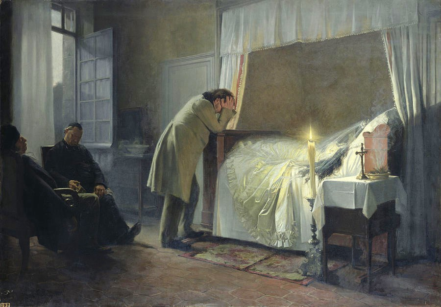 Peinture de Albert Fourié, 1883